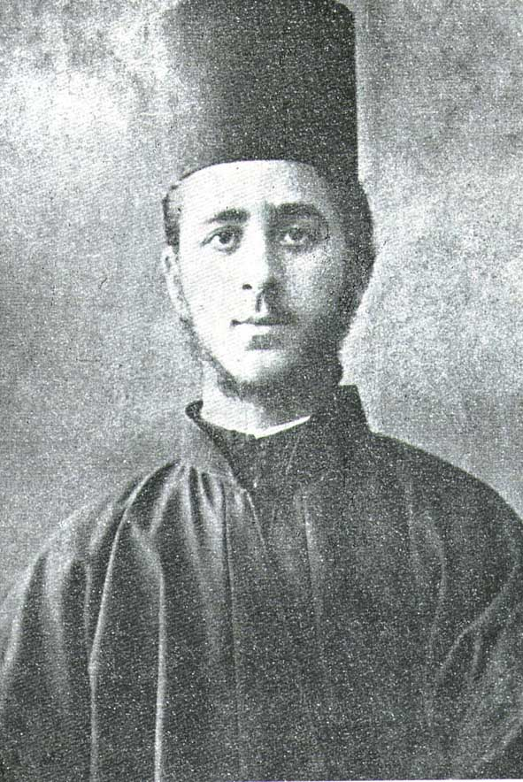 Германос Каравангелис в семинарията в Халки